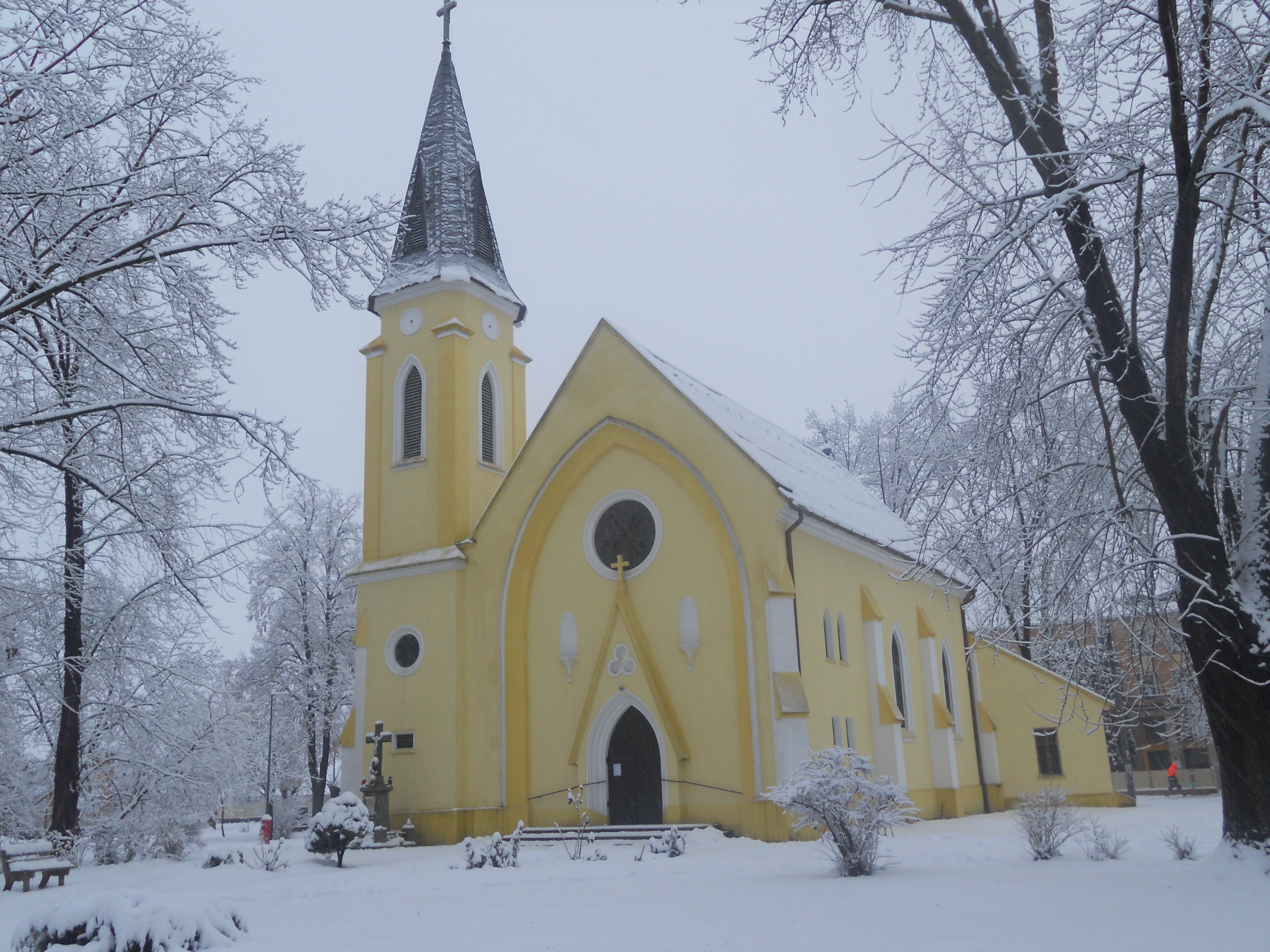 Church of Najsvätejšieho srdca Ježišovho